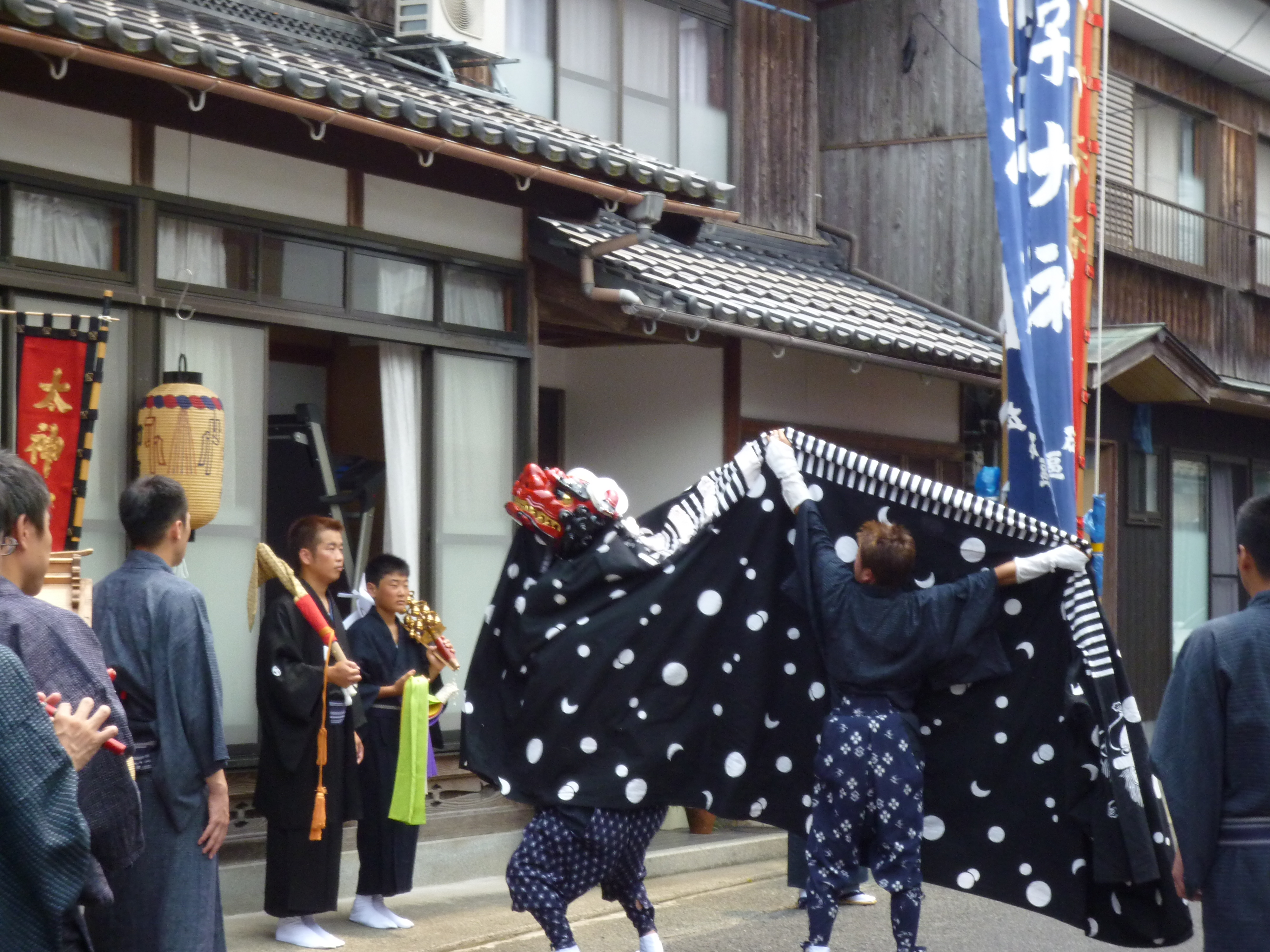 伊根祭。立石区における神楽の出立ち。